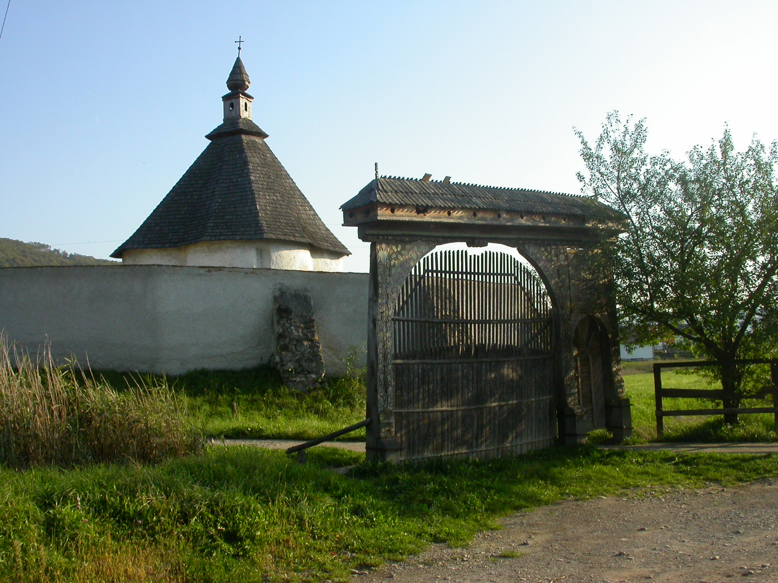 Ansamblul capelei romano-catolice "Inima lui Iisus", sec. XIII - XVI